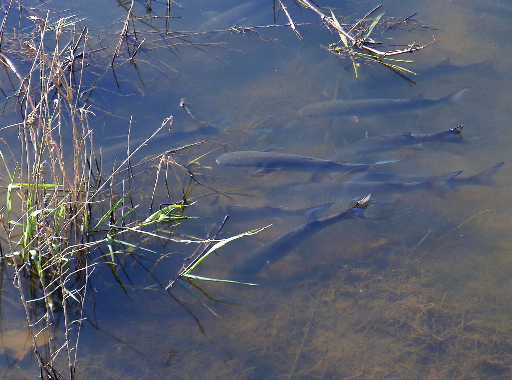 Sainte-Gemmes-sur-Loire (poissons - probablement des mulets porcs- dans la Loire) - Maine-et-Loire, France